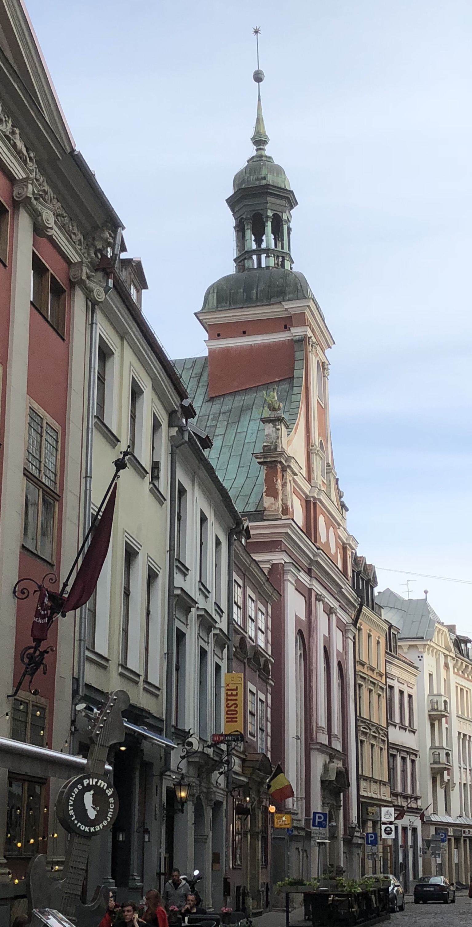 Reformationskirche in Riga